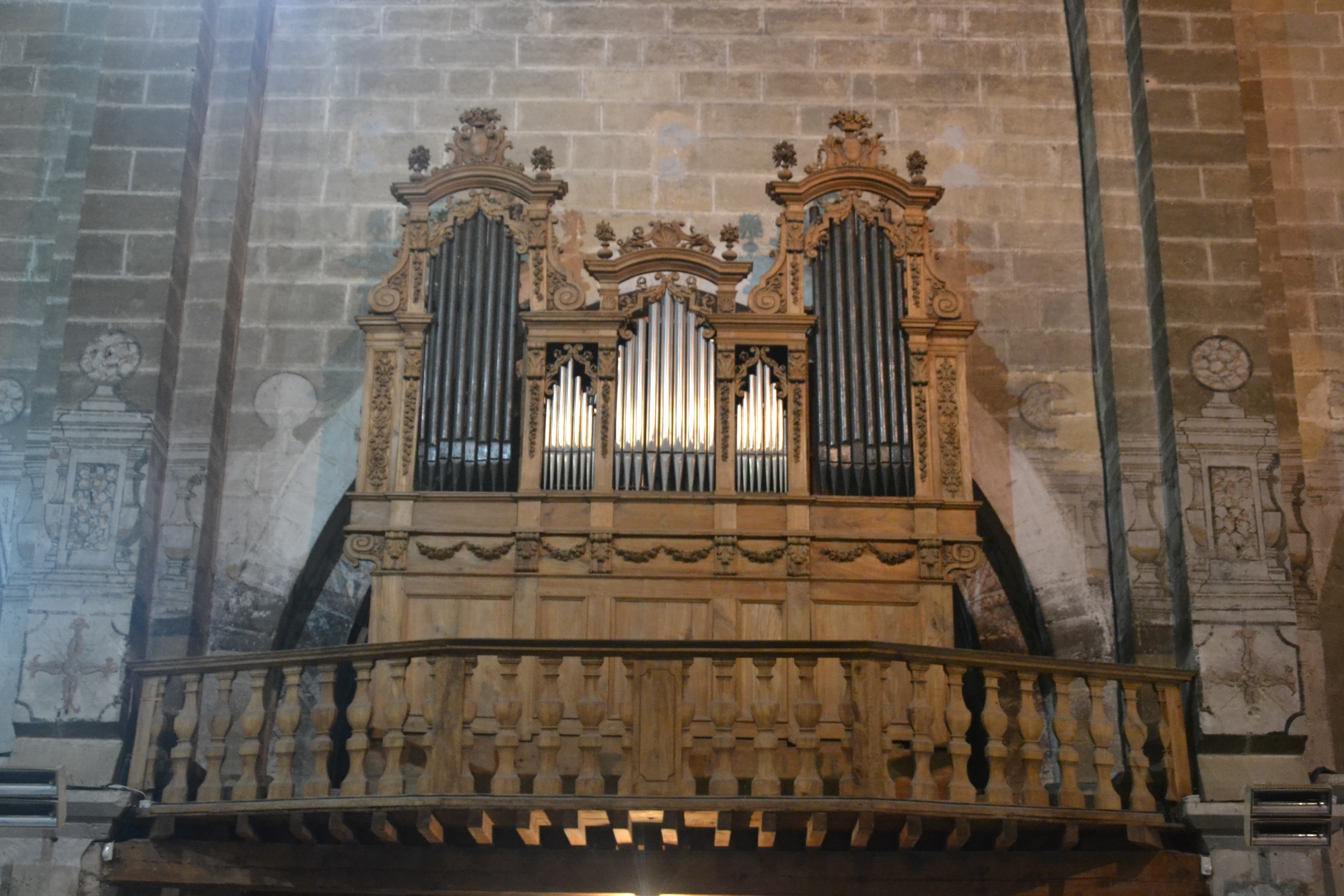 Église Saint-Maurice de Caromb, orgue construit en 1702-1703 par Pierre Galeran et Charles Boisselin réutilisant la façade de l'instrument précédent, restauré en 1978 par Alain Sals.